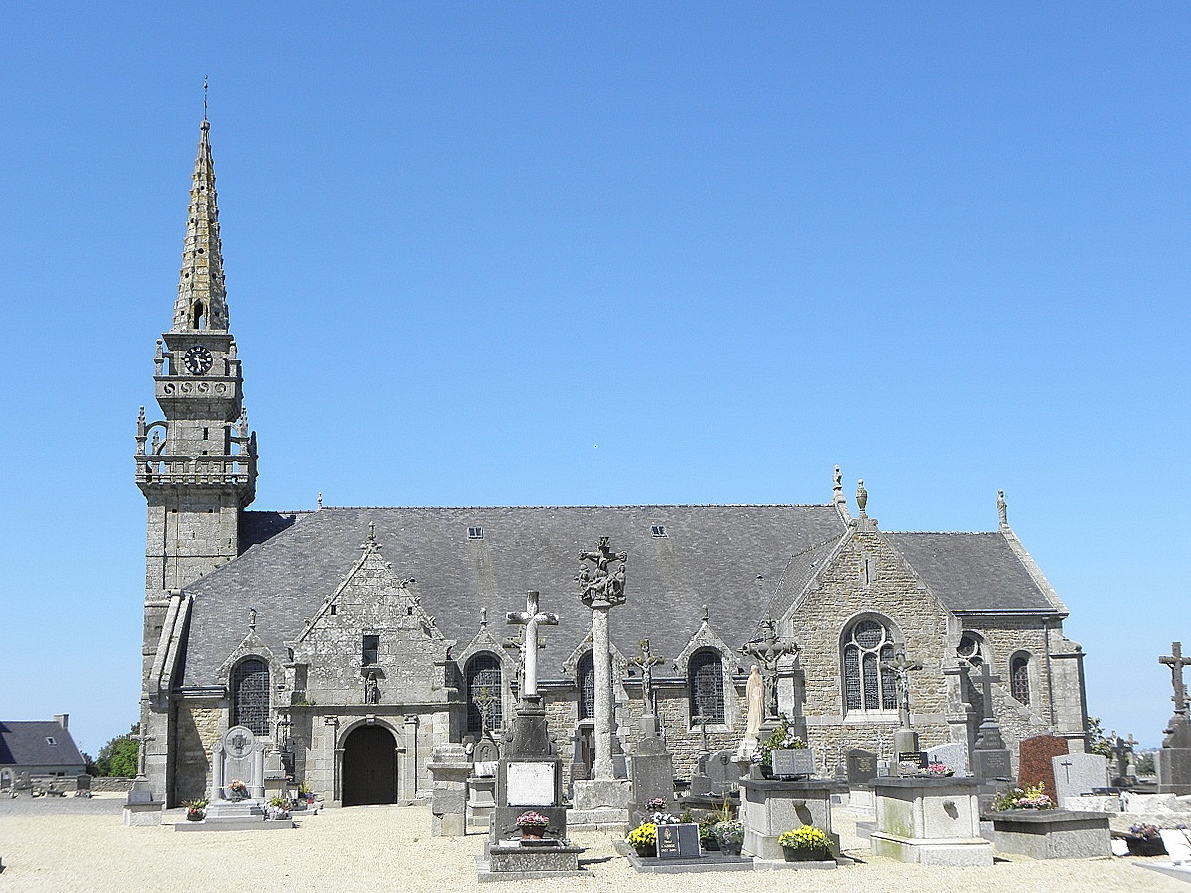 Façade méridionale de l'église Saint-Colomban de Plougoulm (29).